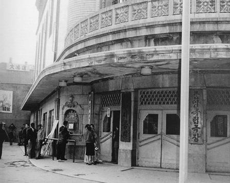 市公館の正面、1957年。